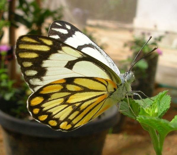 Anaphaeis aurota adult, India